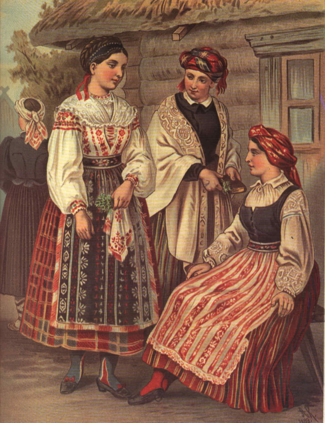 Литовки в національному одязі